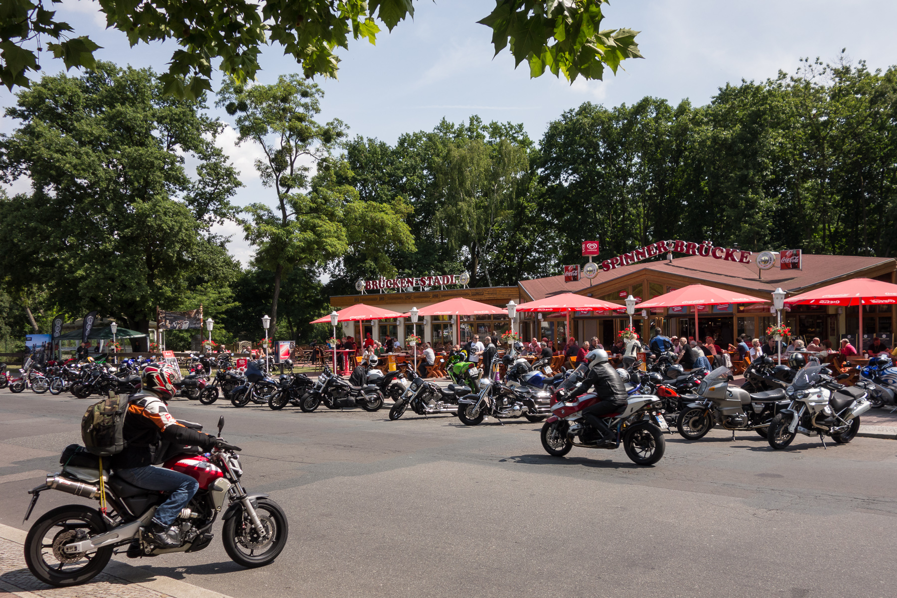 Motorradtreff Spinnerbrücke in Berlin